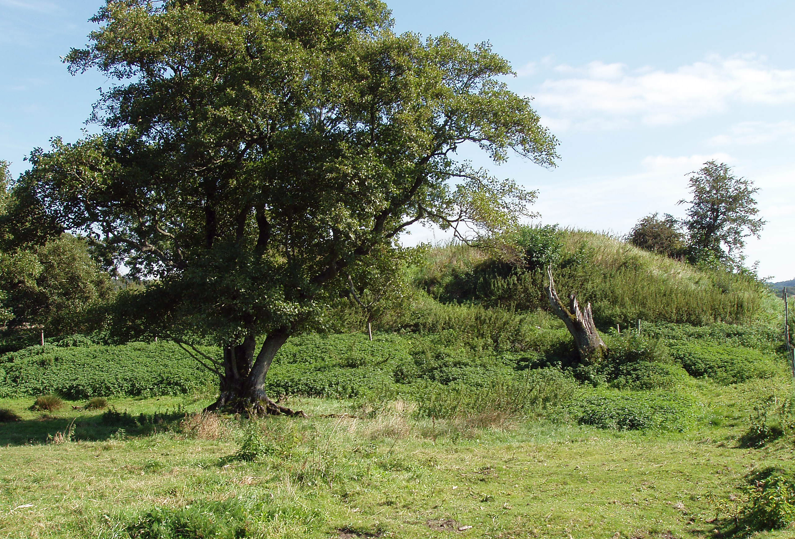 Skjern Voldsted, eller det tidligere Skjern Slot